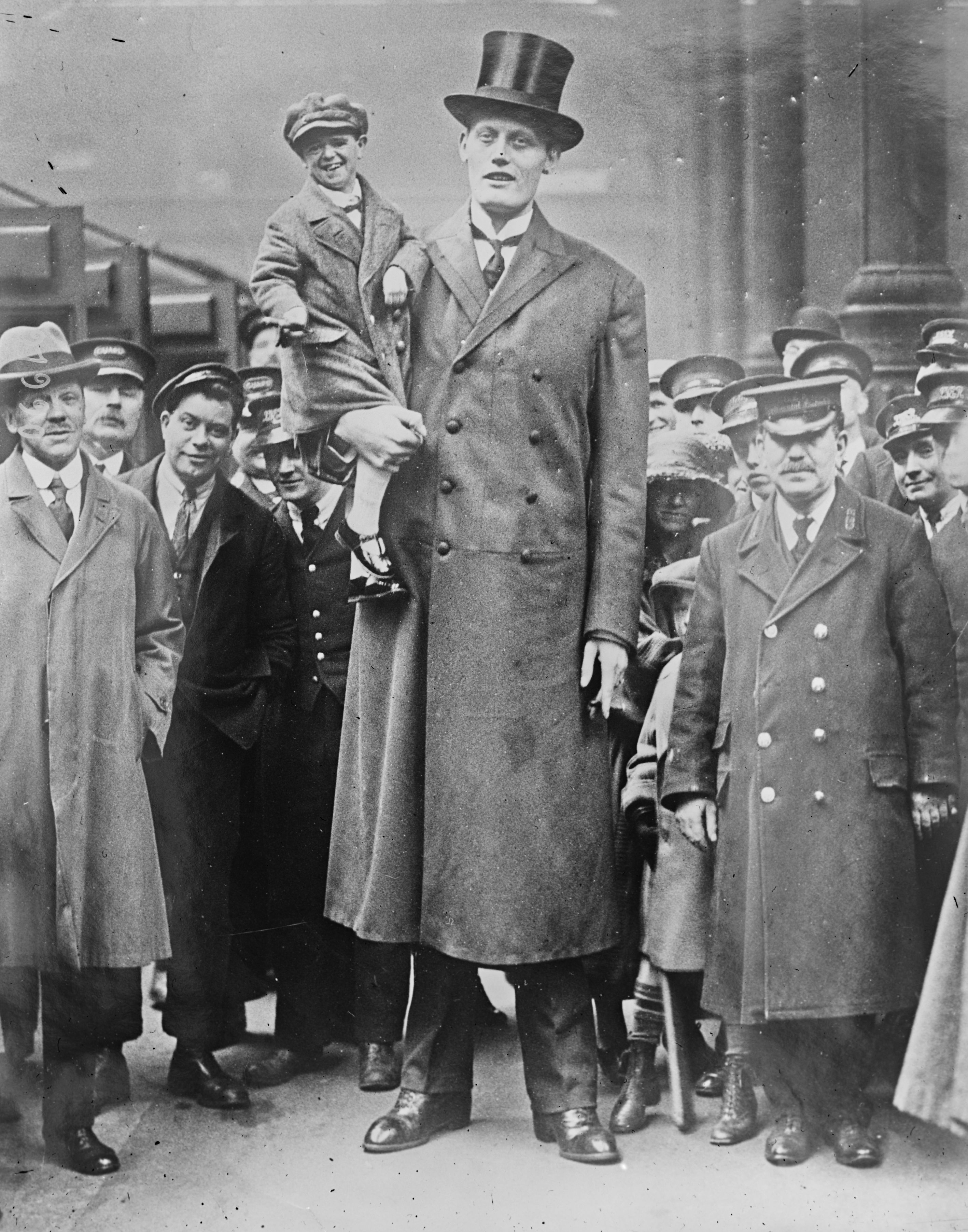 vue 1 - Le géant Van Albert à la gare de Liverpool.